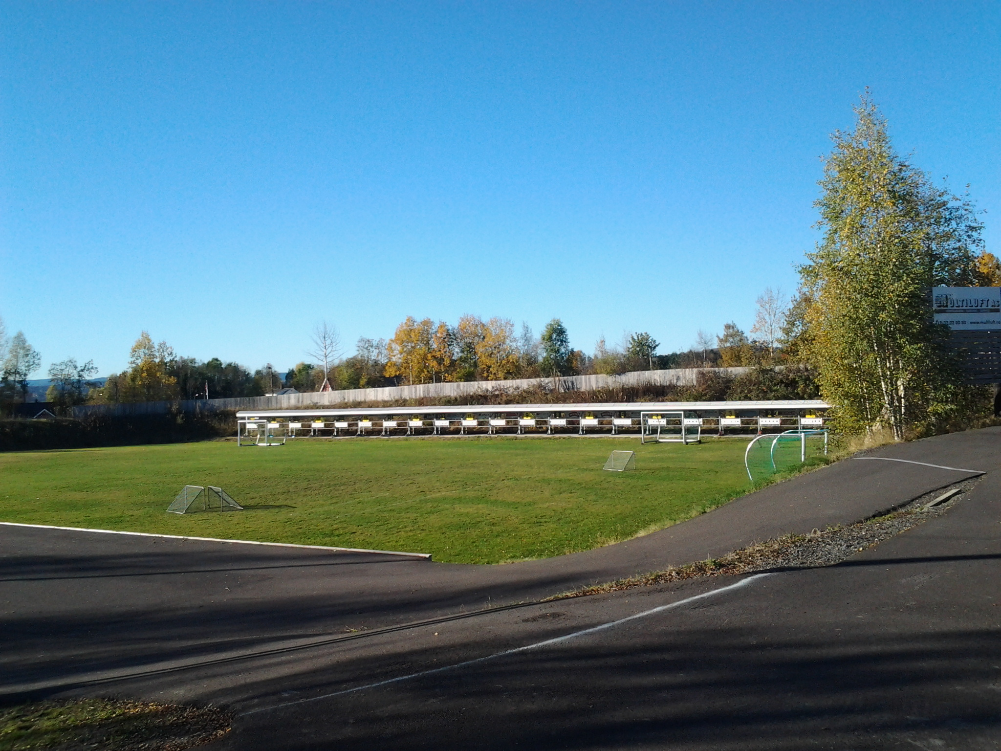 Bibomyra rulleski og rulleskøytebane med skiskytterblinker og 7er-fotballbane.